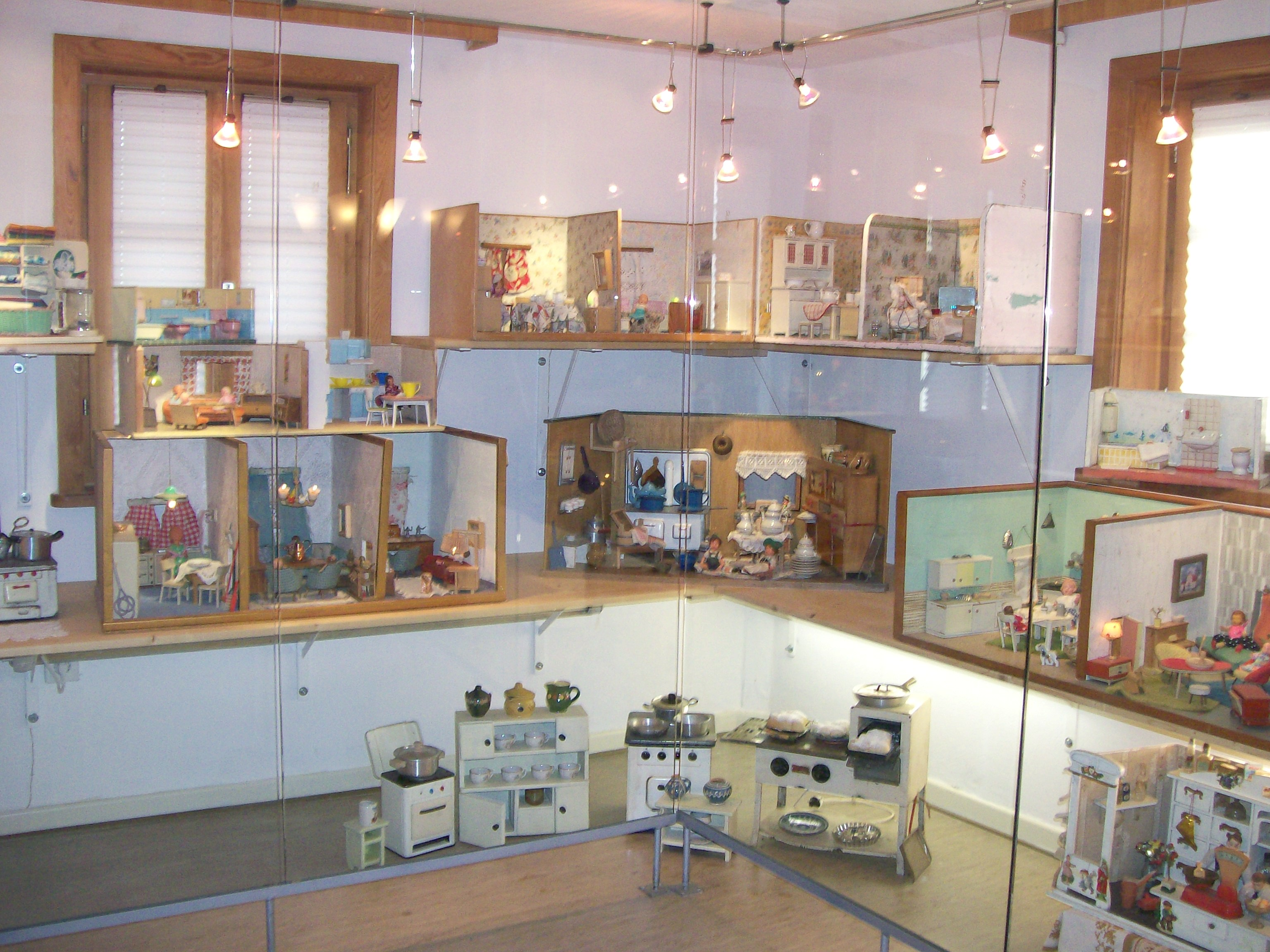 Alsfelder Märchenhaus mit Puppenstuben-Etage.